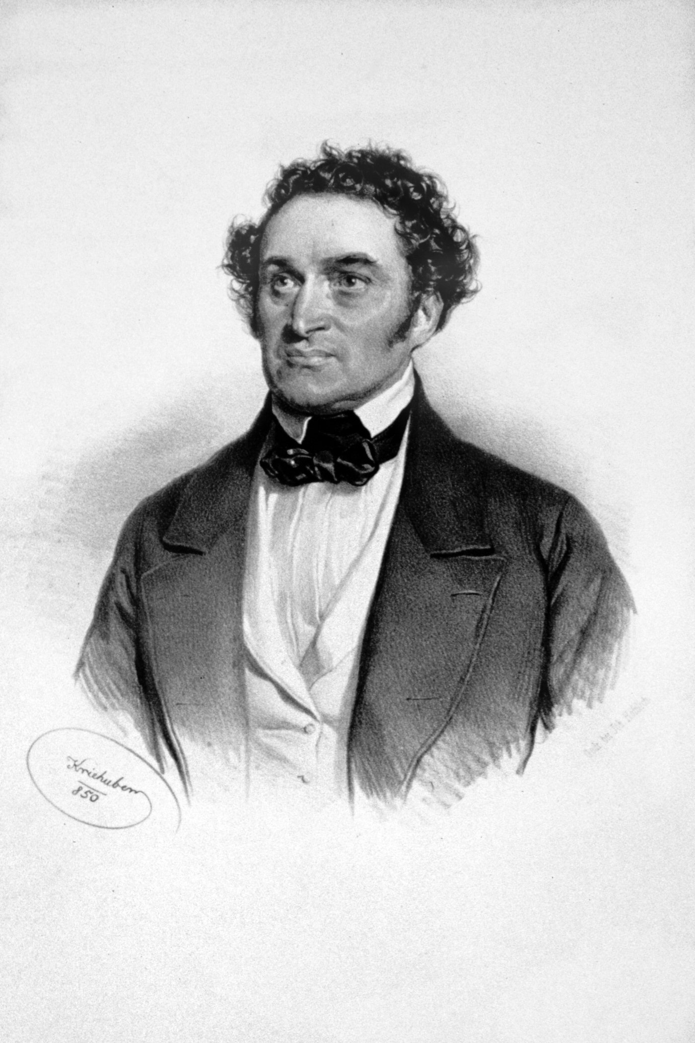 Anton Haizinger, Lithographie von Josef Kriehuber